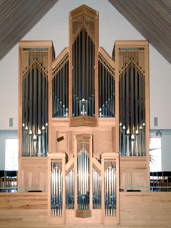 Marcussenorgen, erbaut 1997